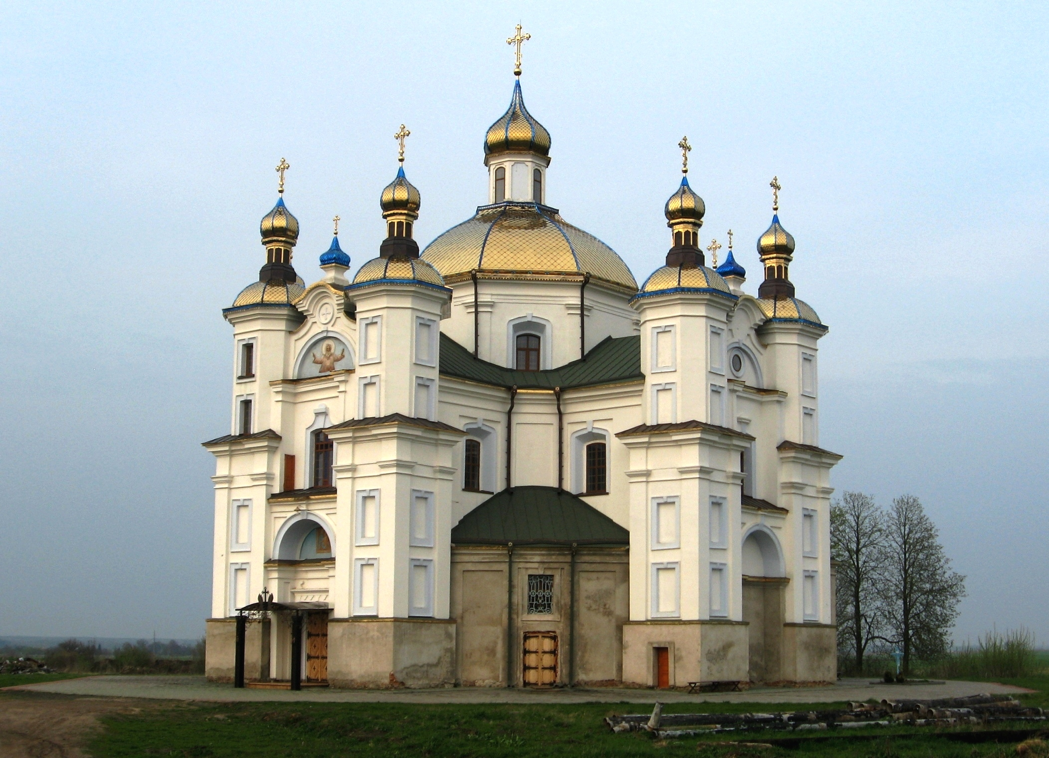 Піддубці, Волинська область. Покровська церква